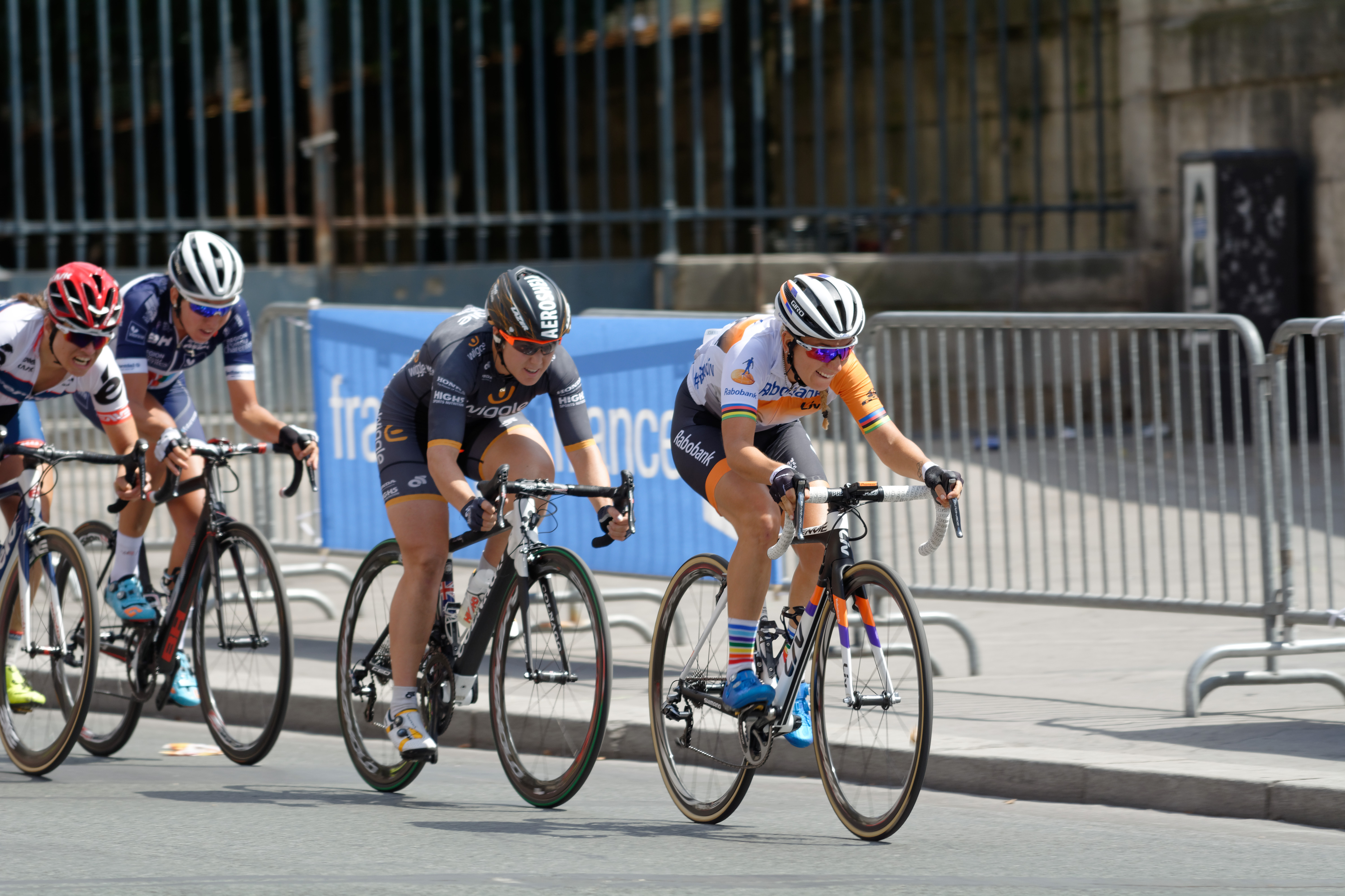 D71_9645_DxO